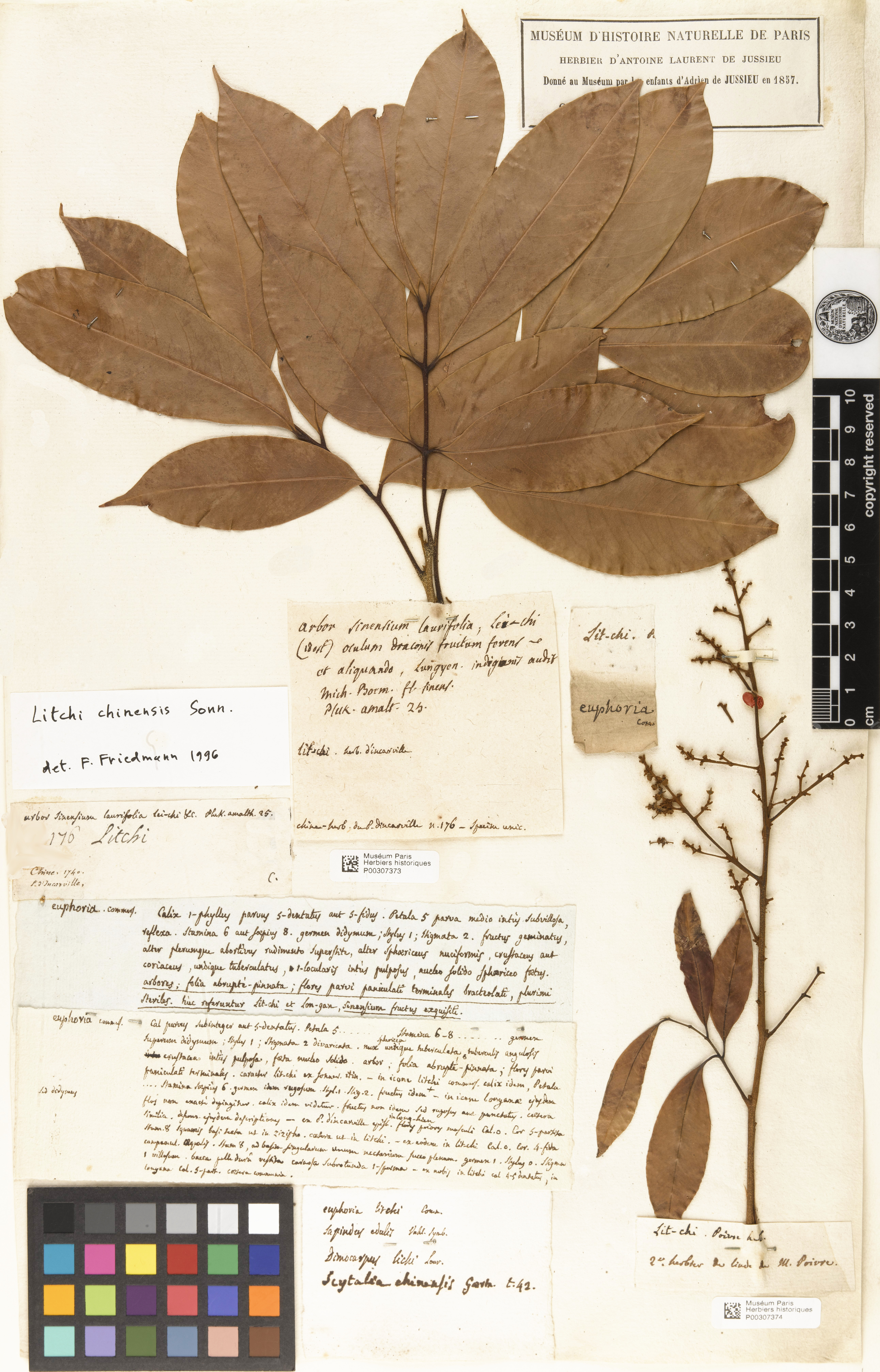 Litchi chinensis